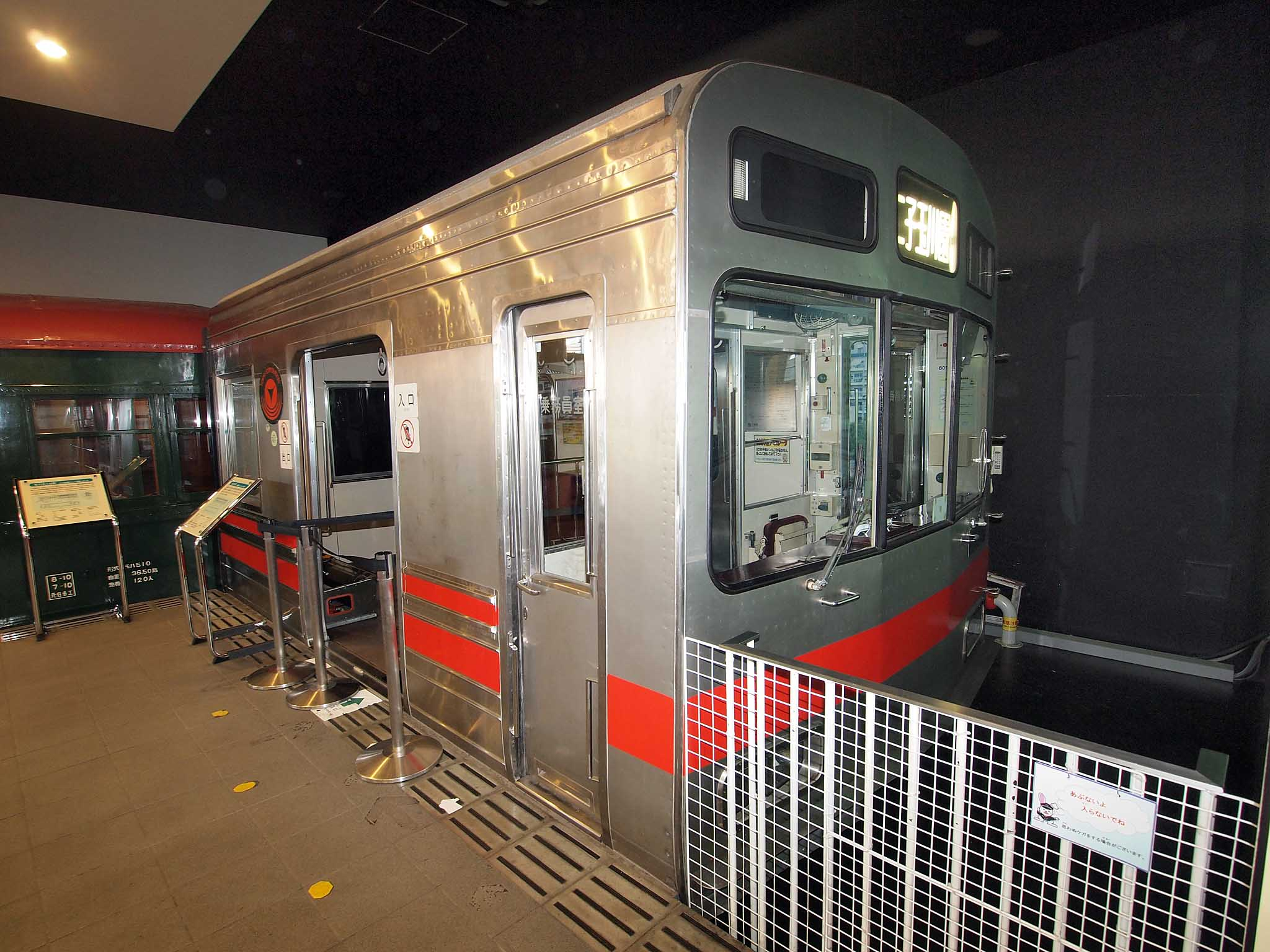 東急電車とバスの博物館の8090系シミュレーター。高津時代から使用されていたもので、当時は東横線と田園都市線が収録されていたが、宮崎台へ移った現在は田園都市線のみ。行先は「二子玉川園」を表示する。